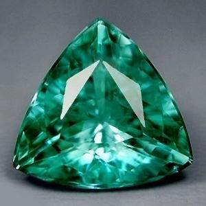 พลอยนี้จะเปลี่ยนเป็นสีแดงหรือแดงแกมม่วง หากท่านส่องด้วยแสงไฟจากหลอดอินแคนเดสเซนส์(แสงสีส้ม)ถือเป็นพลอยที่แปลก ได้รับความนิยมมาก